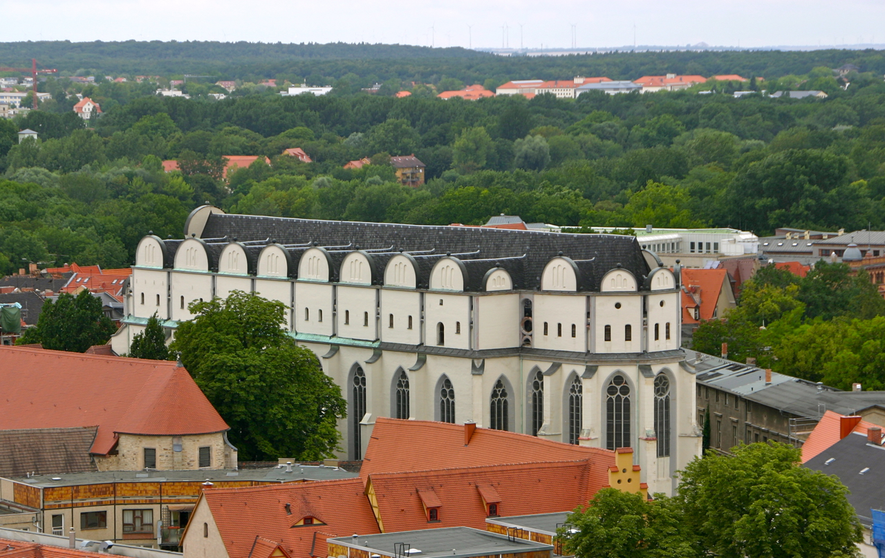 Halle (Saale), Blick von den Hausmannstürmen der Marktkirche Unser Lieben Frauen.